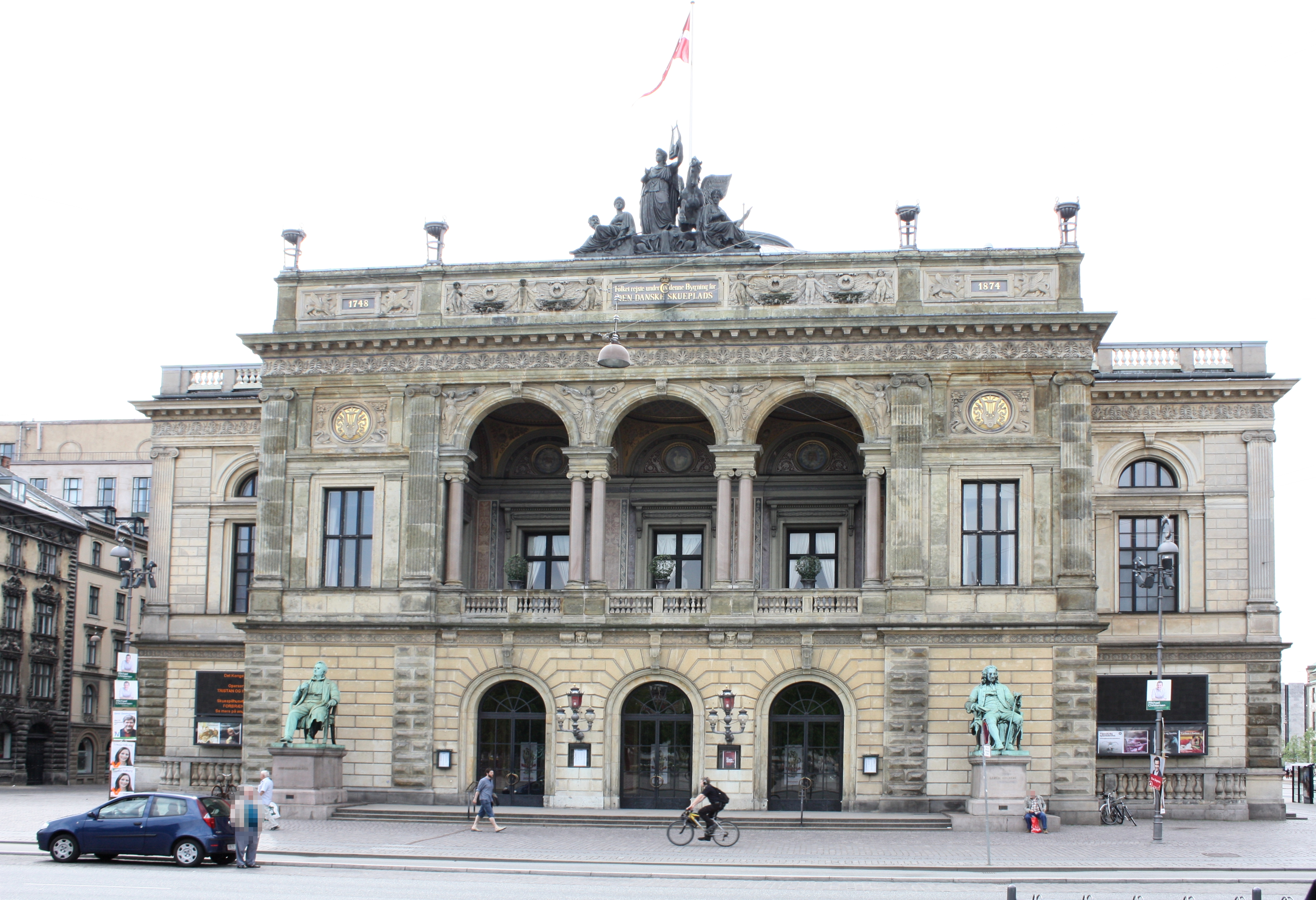 Kopenhagen 2009